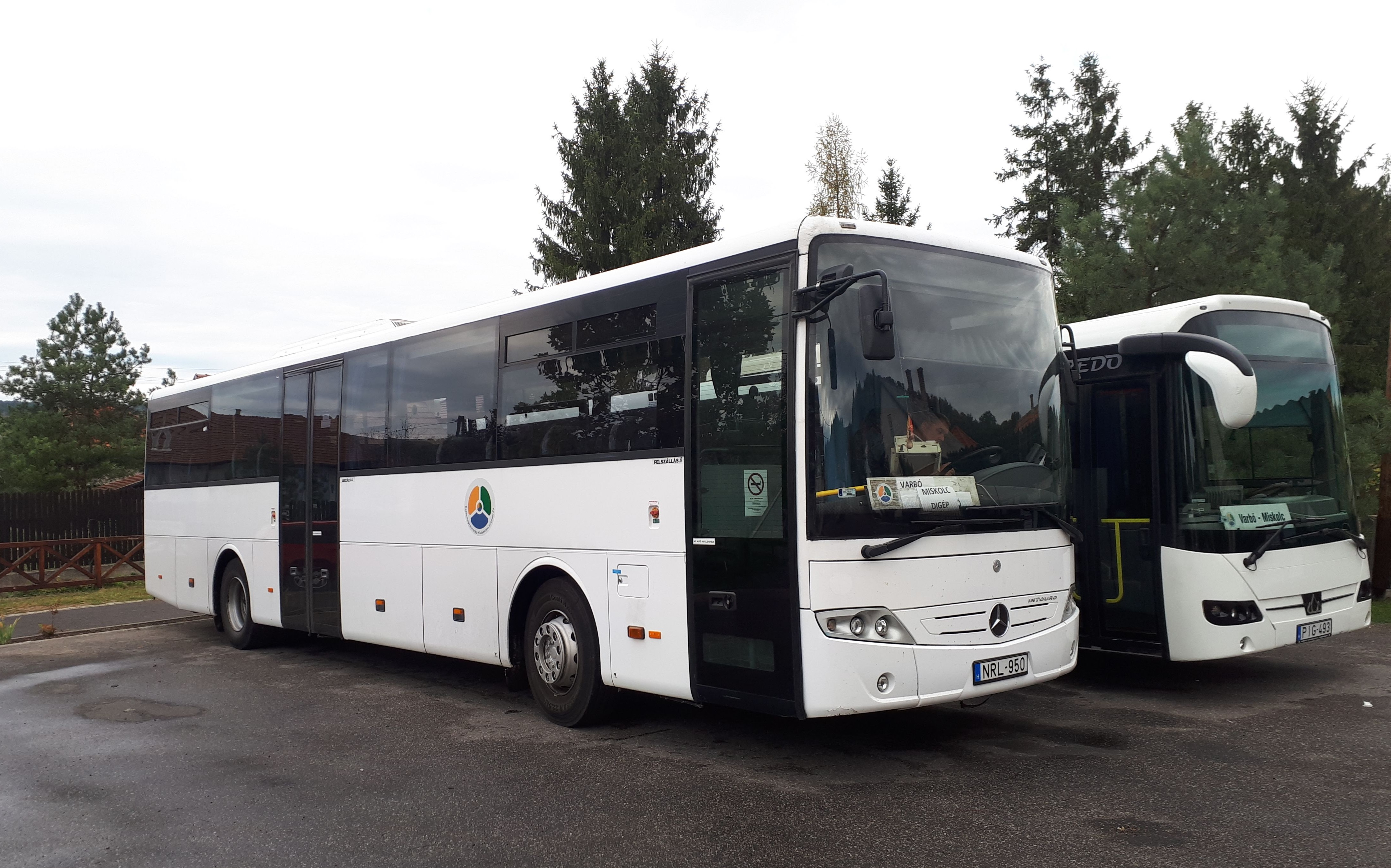 Az ÉMKK NRL-950 rendszámú Mercedes Intouro busza Varbón, a 3756-os helyközi járaton.